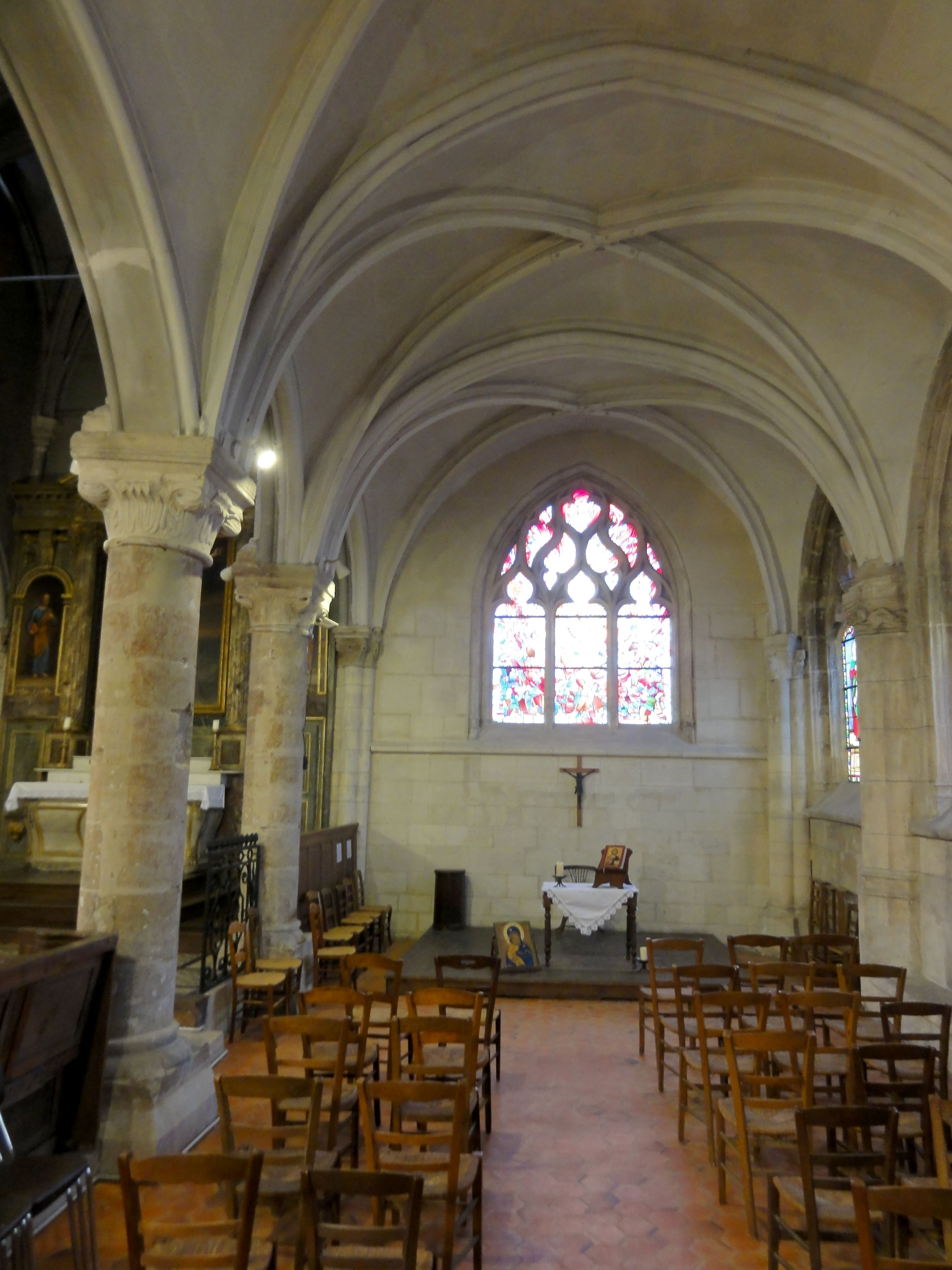 Collatéral sud, vue vers l'est.